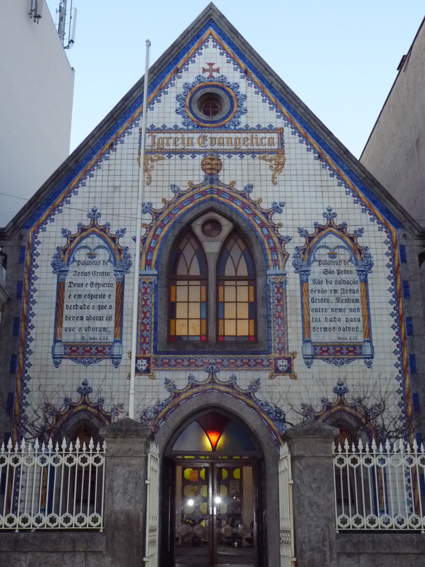 Igreja Evangelica Metodista do Mirante na Praça do Coronel Pacheco, Cedofeita, Porto, Portugal. (N.º IPA PT011312040471)